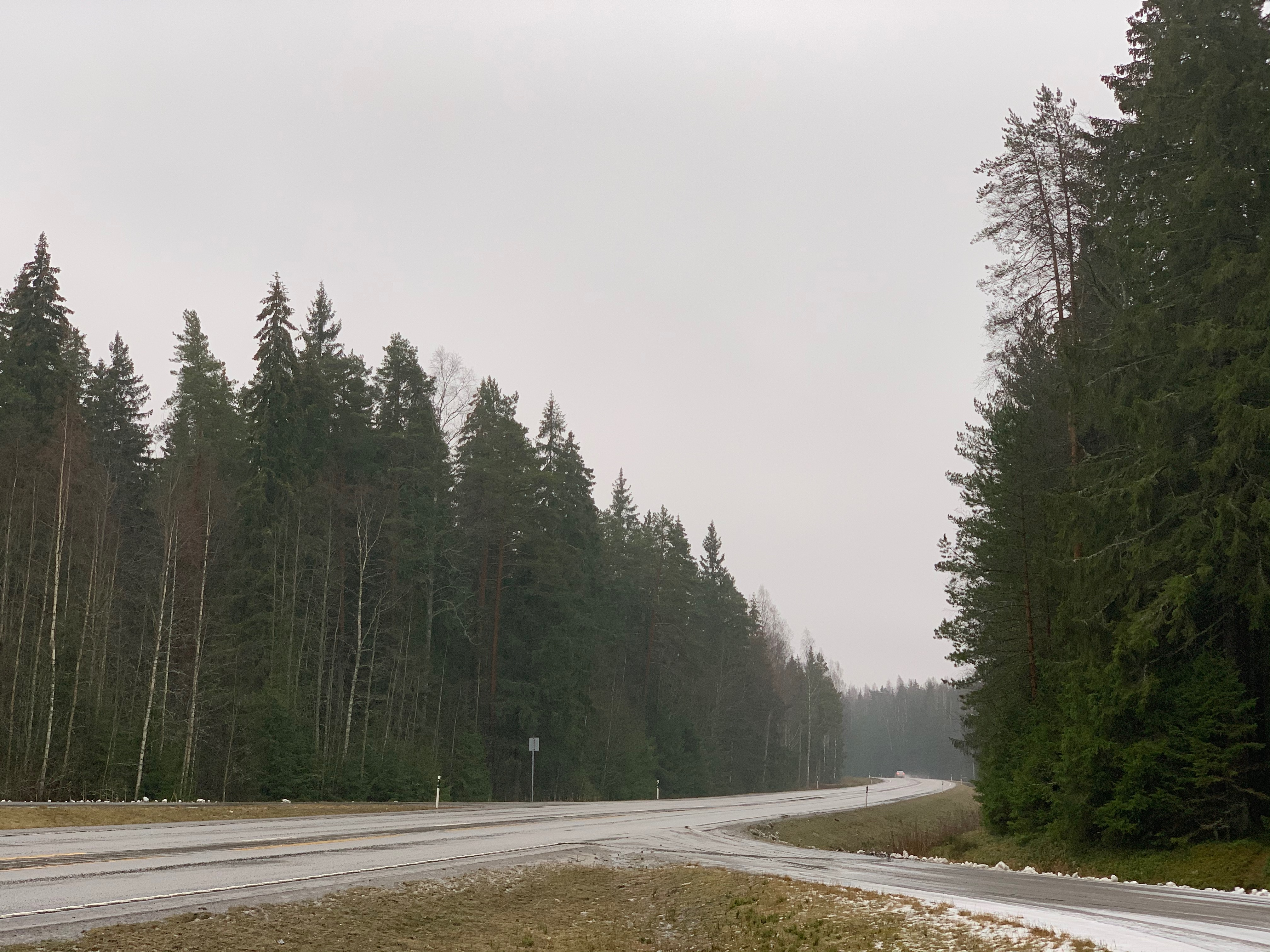 Аскола